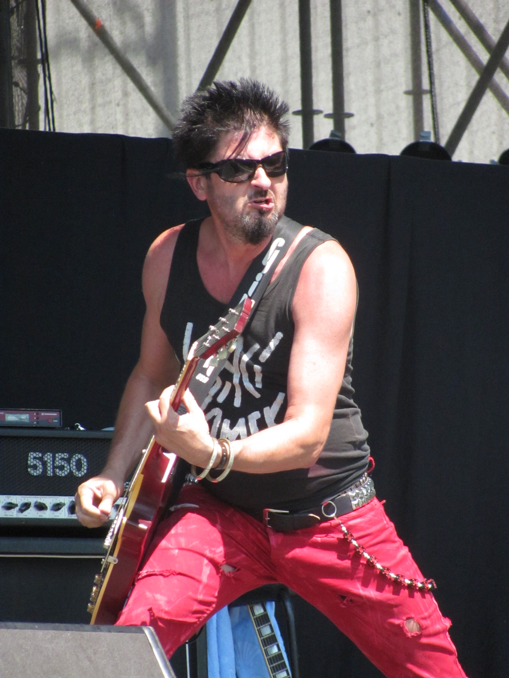 Michal Pixa, Visací zámek, Ronnie James Dio stage, Masters of Rock 2010